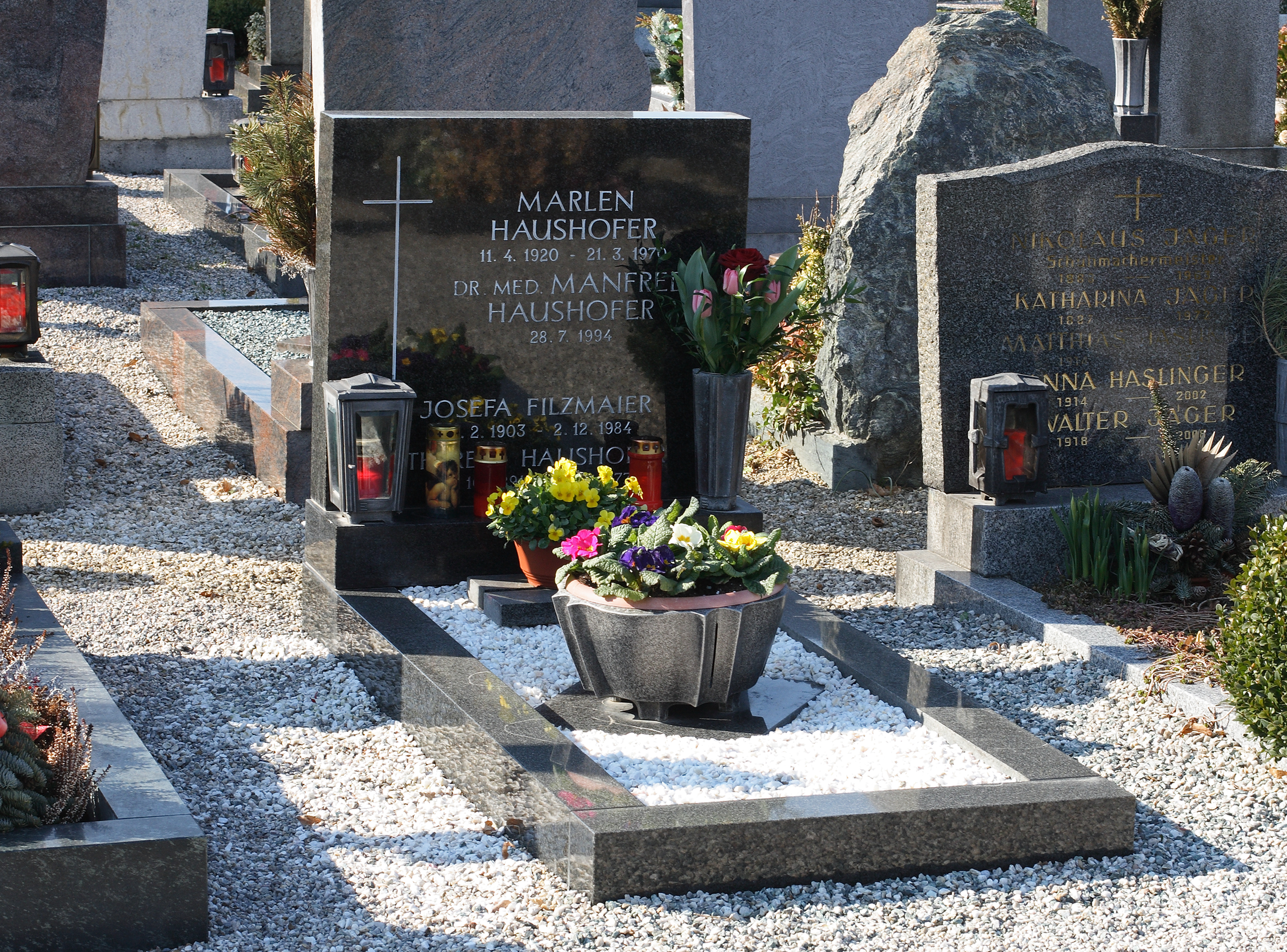 Das Grab Marlen Haushofers am Steyrer Taborfriedhof